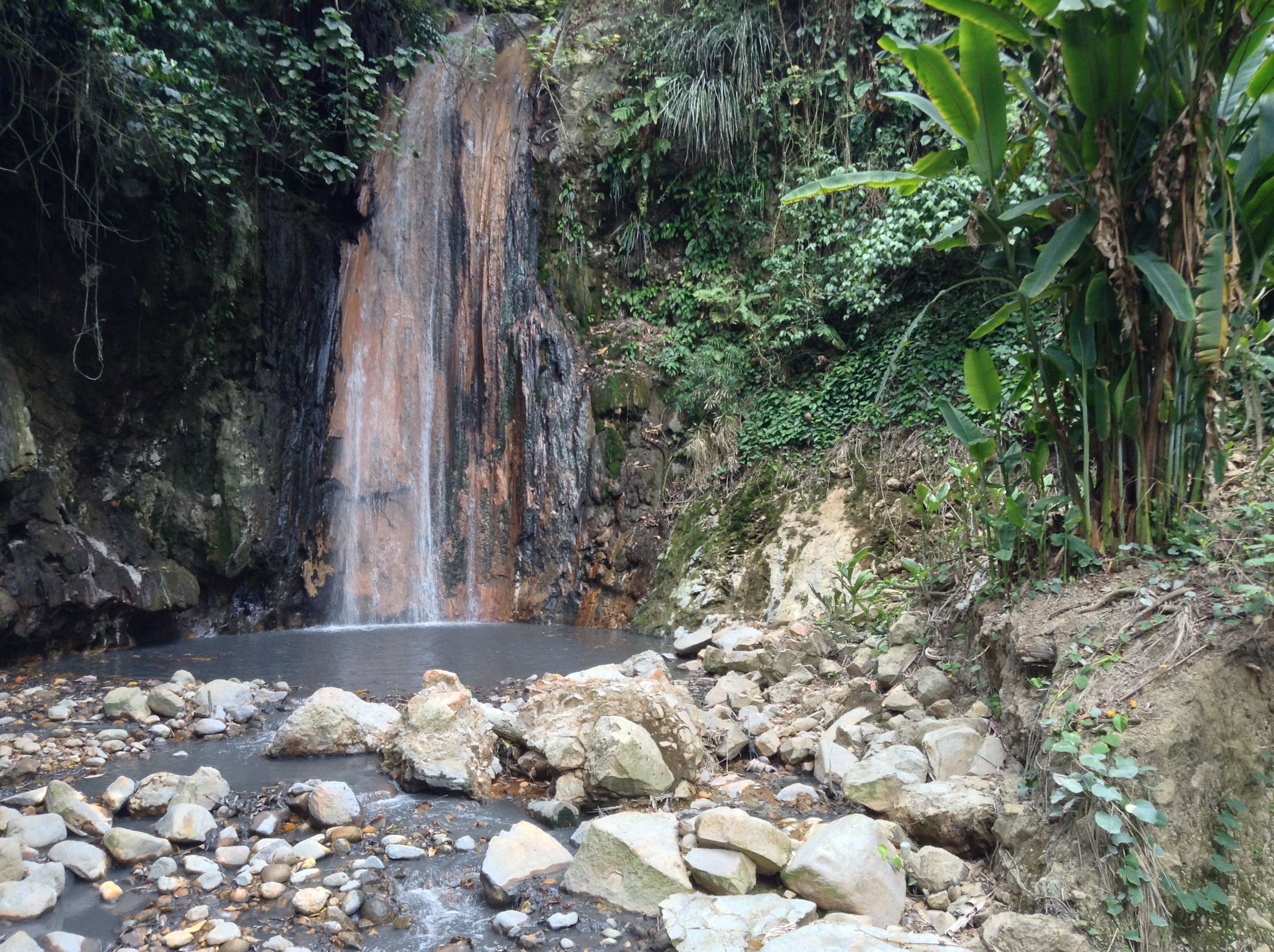 Les chutes d'eau du jardin botanique de Ste Lucie